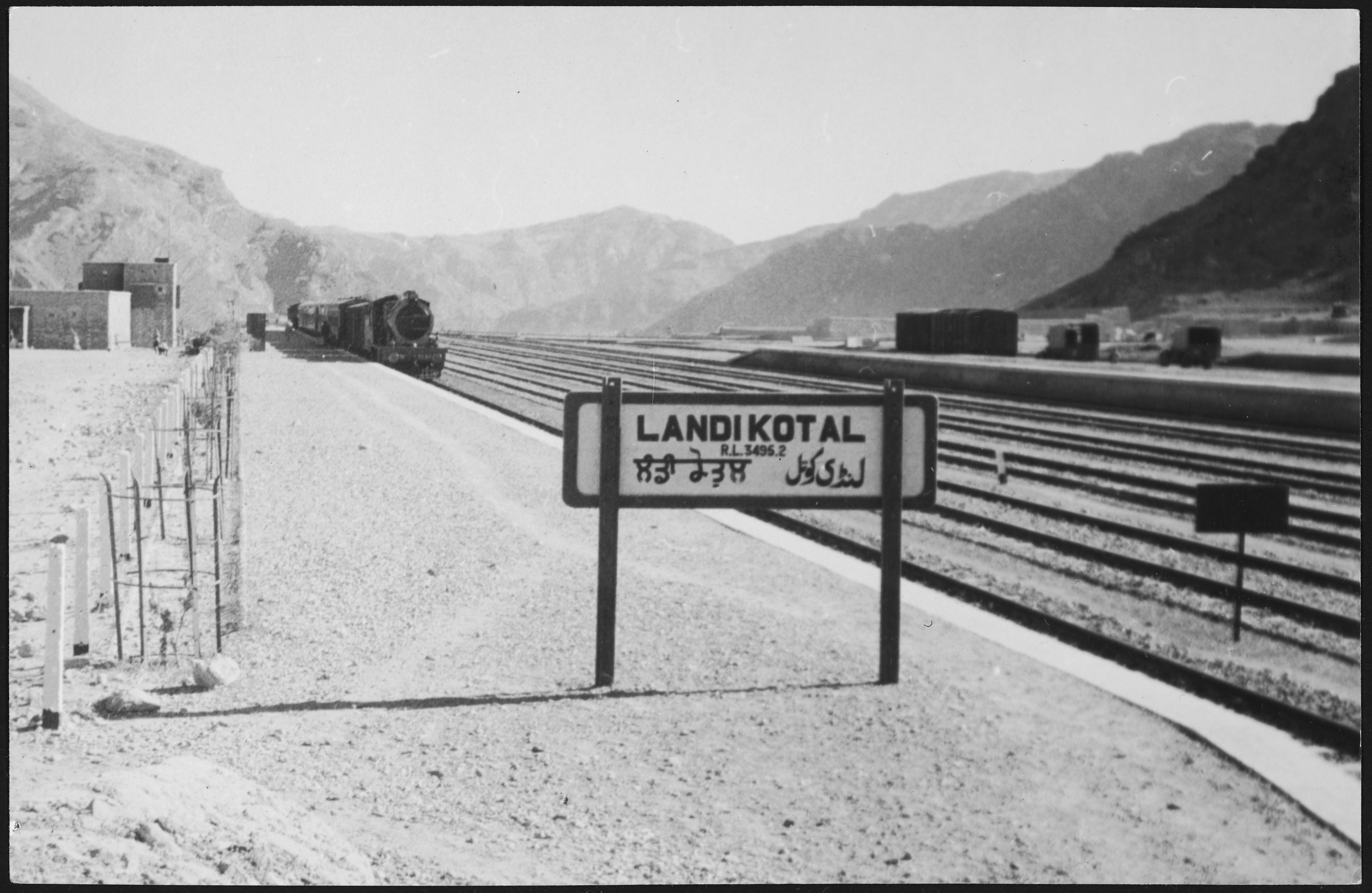 Britisch-Indien, Landi Kotal (Landikotal): Landschaft; Ein Zug am Bahnhof von Landi Kotal